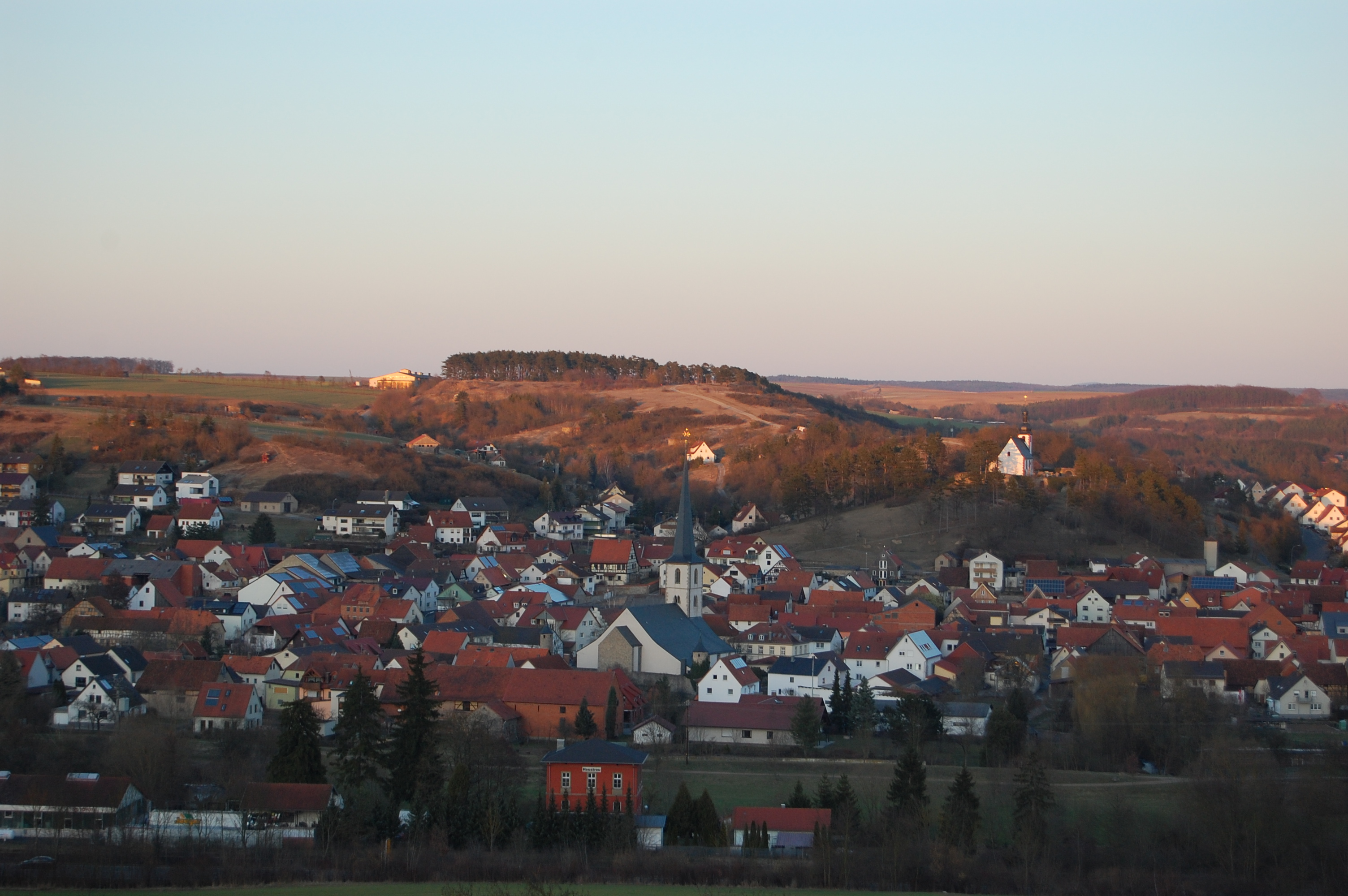 Heustreu, Kreis Rhön-Grabfeld (2011)